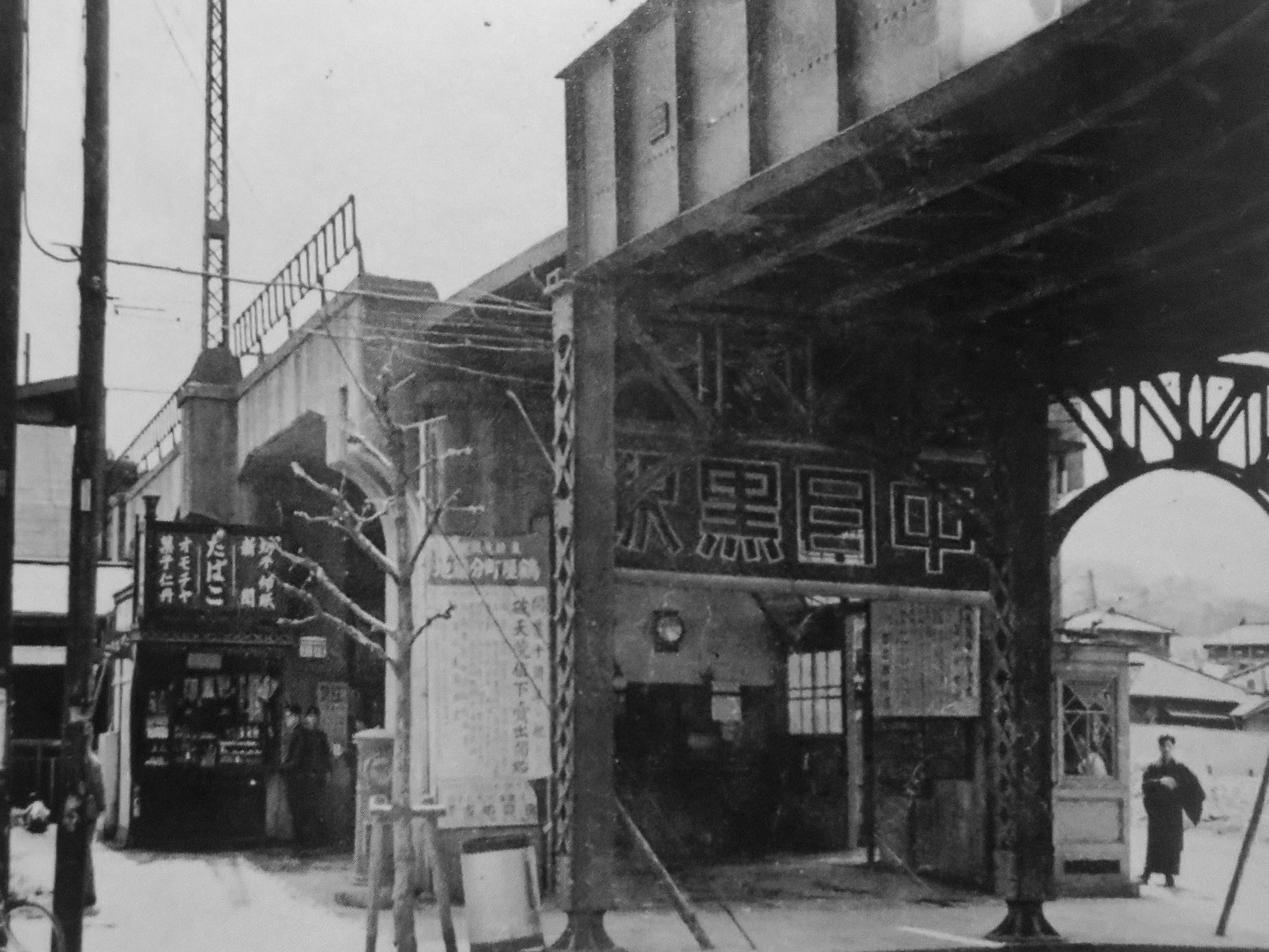 中目黒駅。1936年撮影。